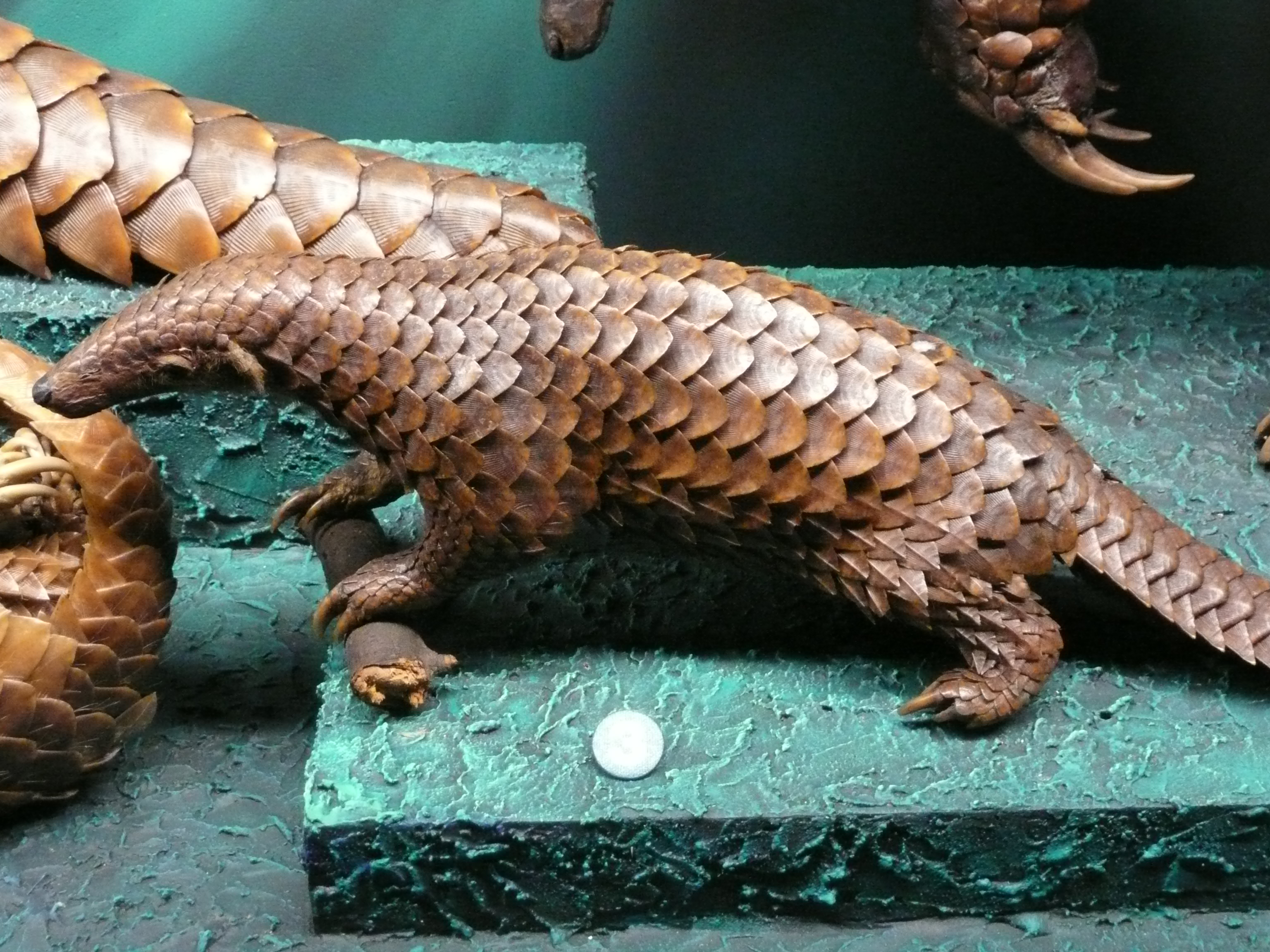 Stuffed Manis javanica in Muséum d'histoire naturelle de Genève Map: 46° 11' 56" N 6° 9' 30" E